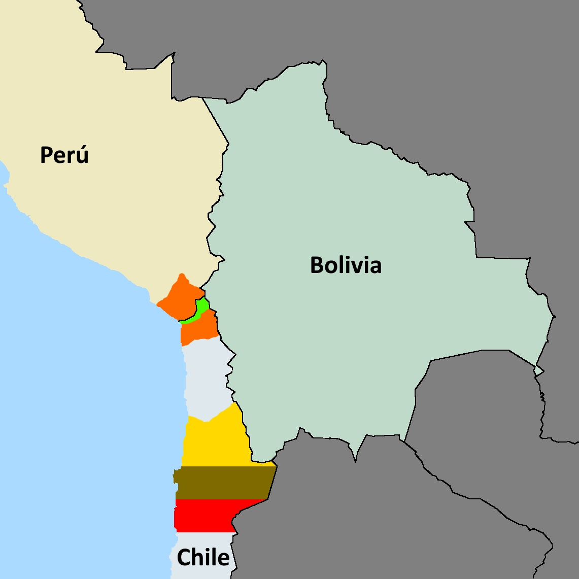 Mediterraneidad de Bolivia con los territorios que alguna vez tuvo, reclamo o le ofrecieron.